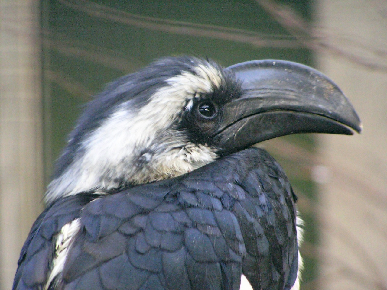 Tockus deckeni, Von der Decken's Hornbill, Von-der-Decken-Toko (female)